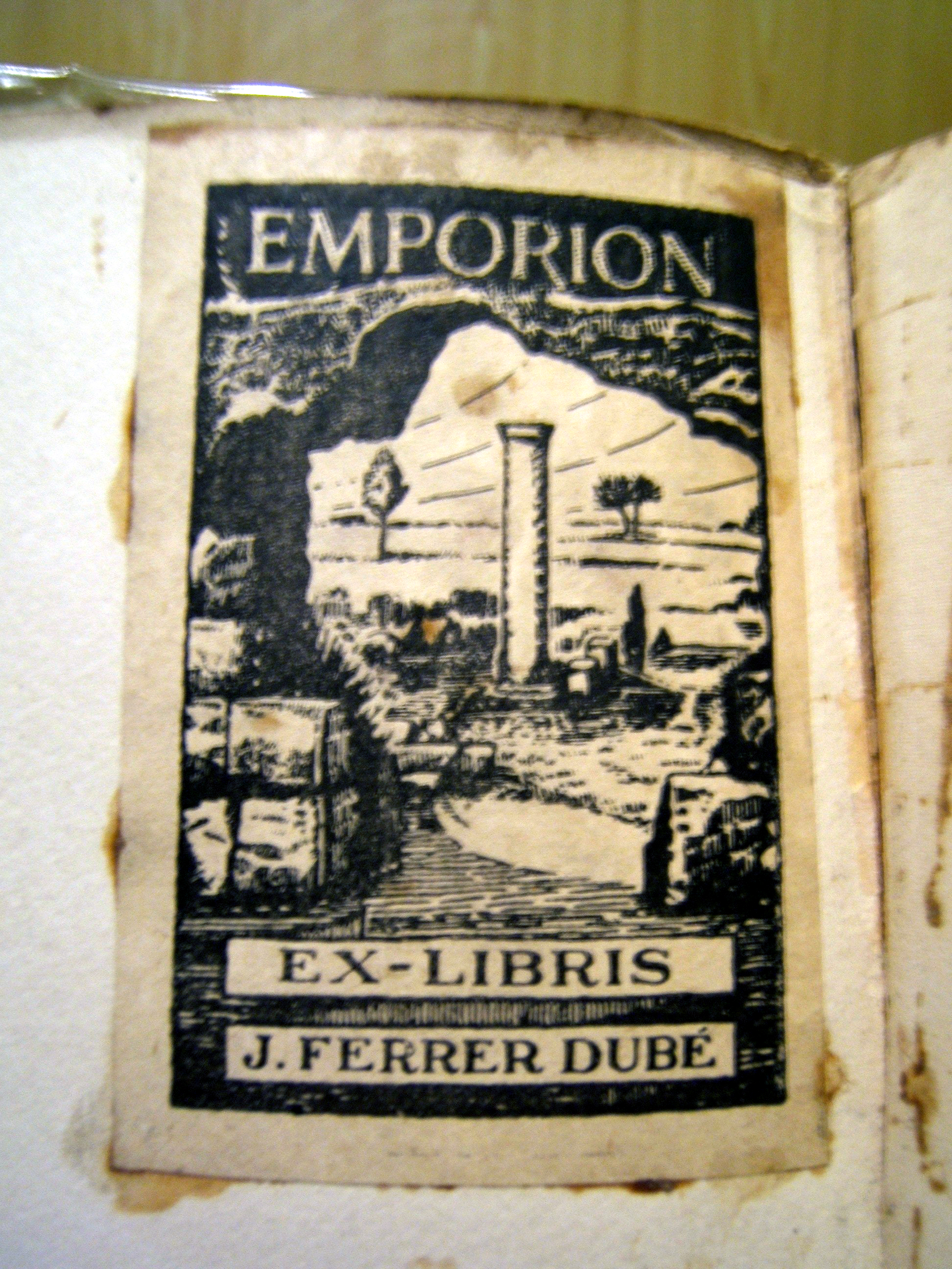 Fotografía de un Ex libris procedente de la biblioteca del propio fotógrafo. Imagen tomada por Iulius para el artículo Ex libris de la wikipedia en español.